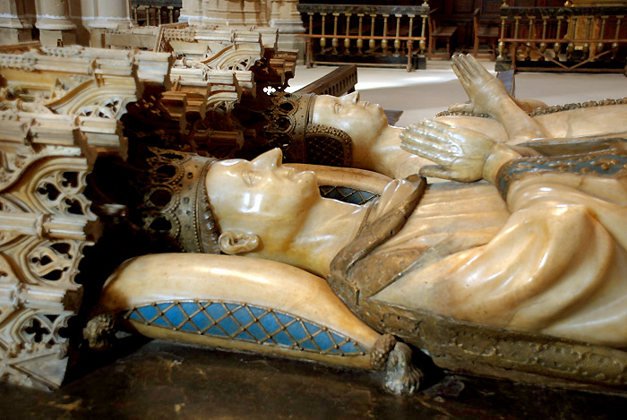 Detalle sepulcro Carlos III el Noble